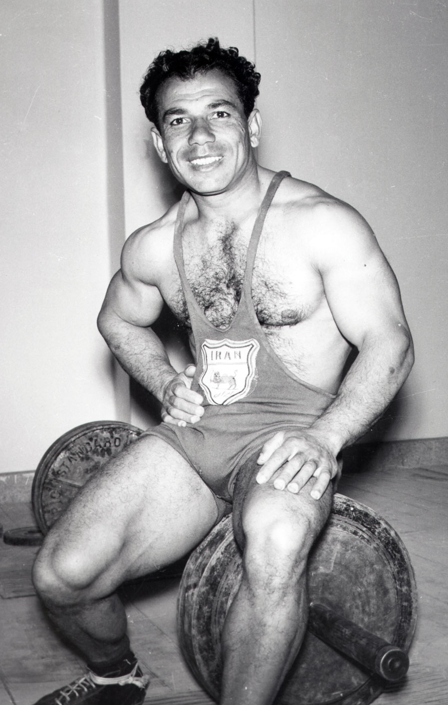 Mahmoud Namjoo